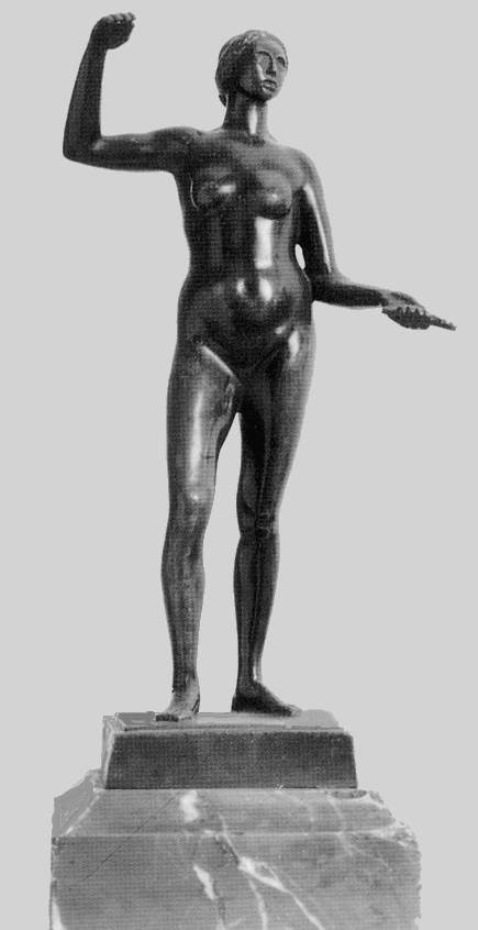 Figure Holding Ear of Corn (Kalászt tartó)